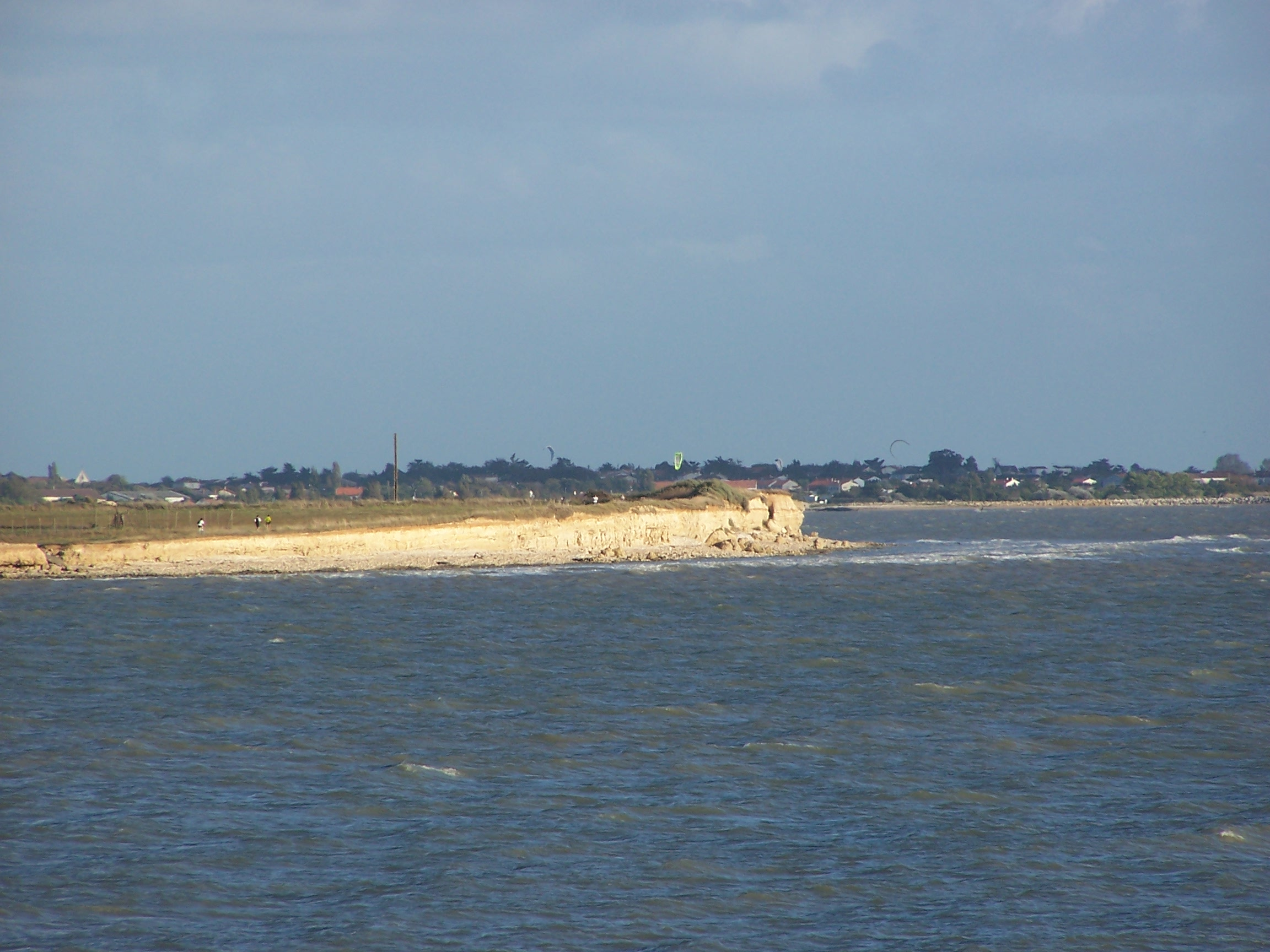 Photographie de la pointe de Roux, depuis les Minimes, à La Rochelle, en Charente-Maritime.